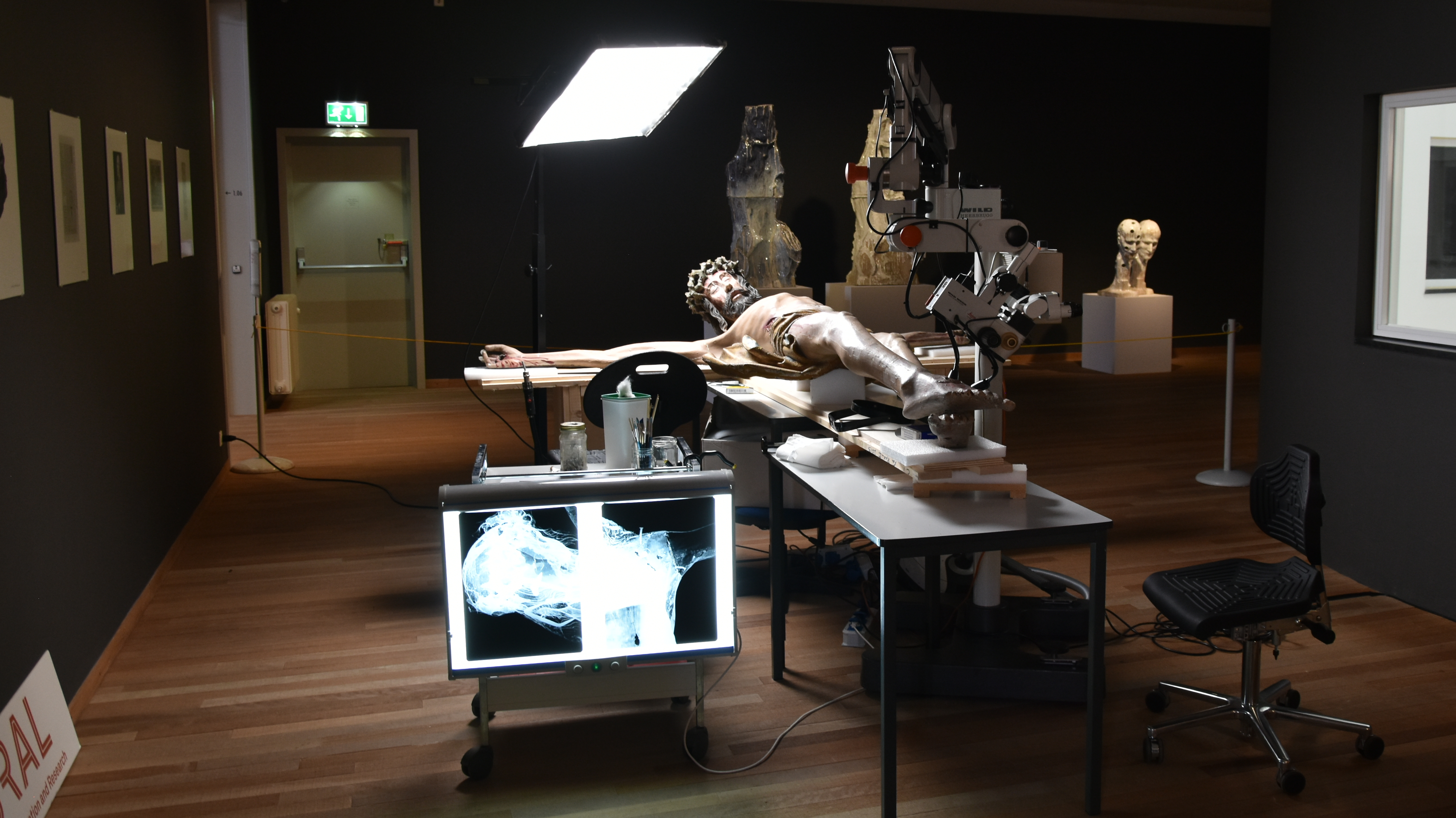 Restauratie (corpus van Christus) - Bonnefantenmuseum (Maastricht)